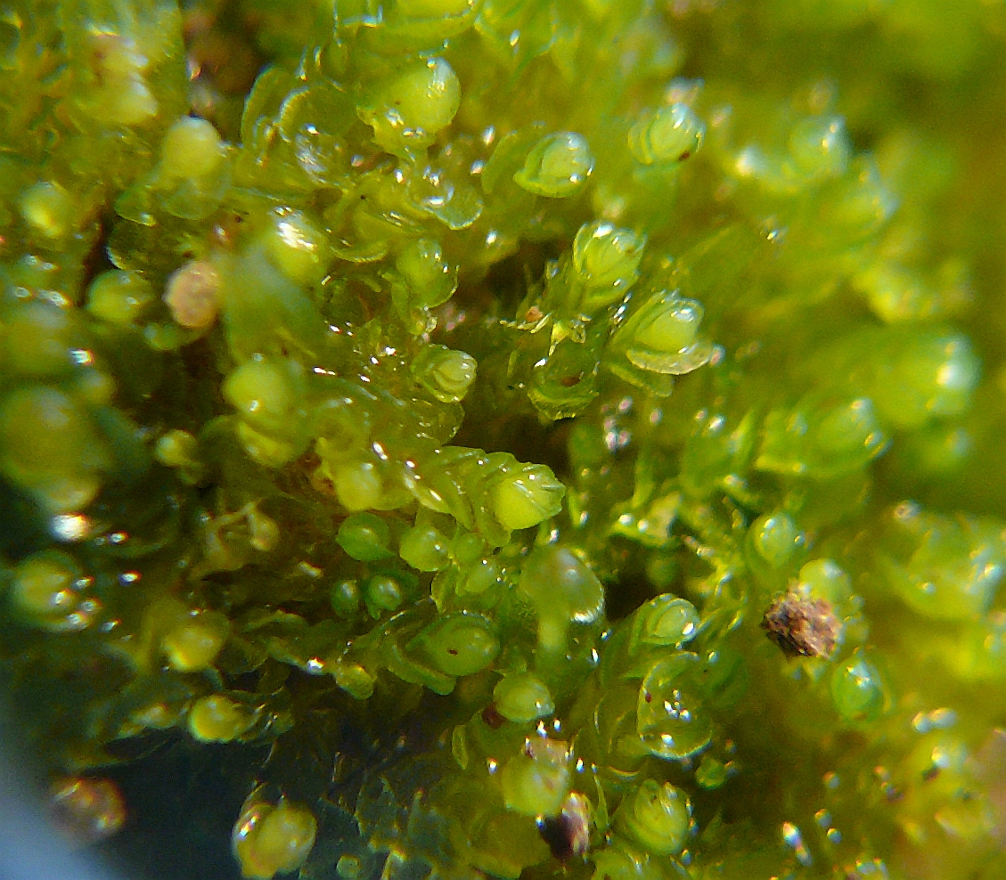 Nardia scalaris, Schwäbisch-Fränkischer Wald, Deutschland